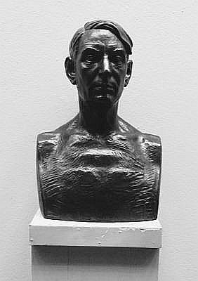 Byst över Yngve Larsson av John Lundqvist i Stockholms stadshus.